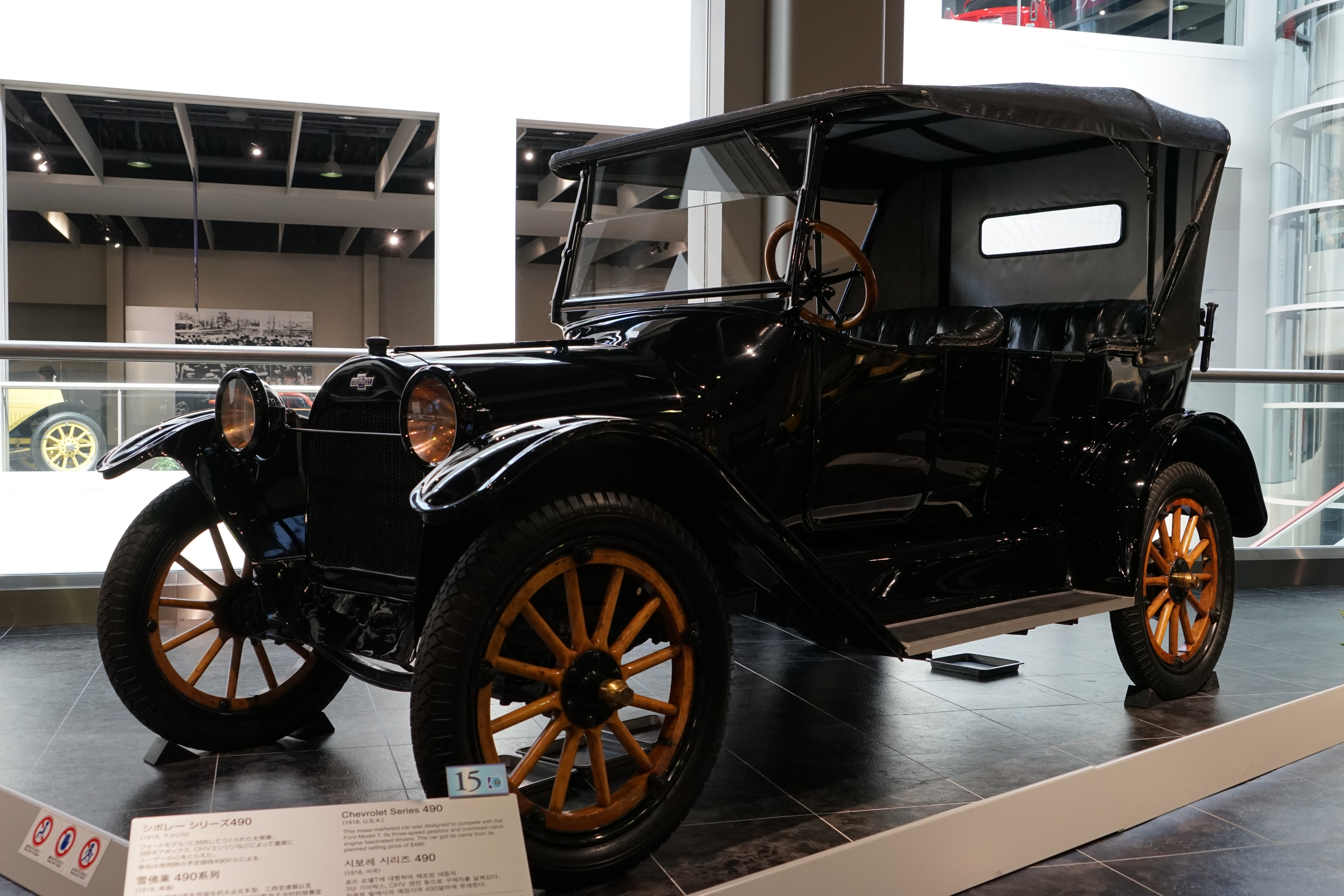 2015年9月19日、トヨタ博物館にて本人撮影